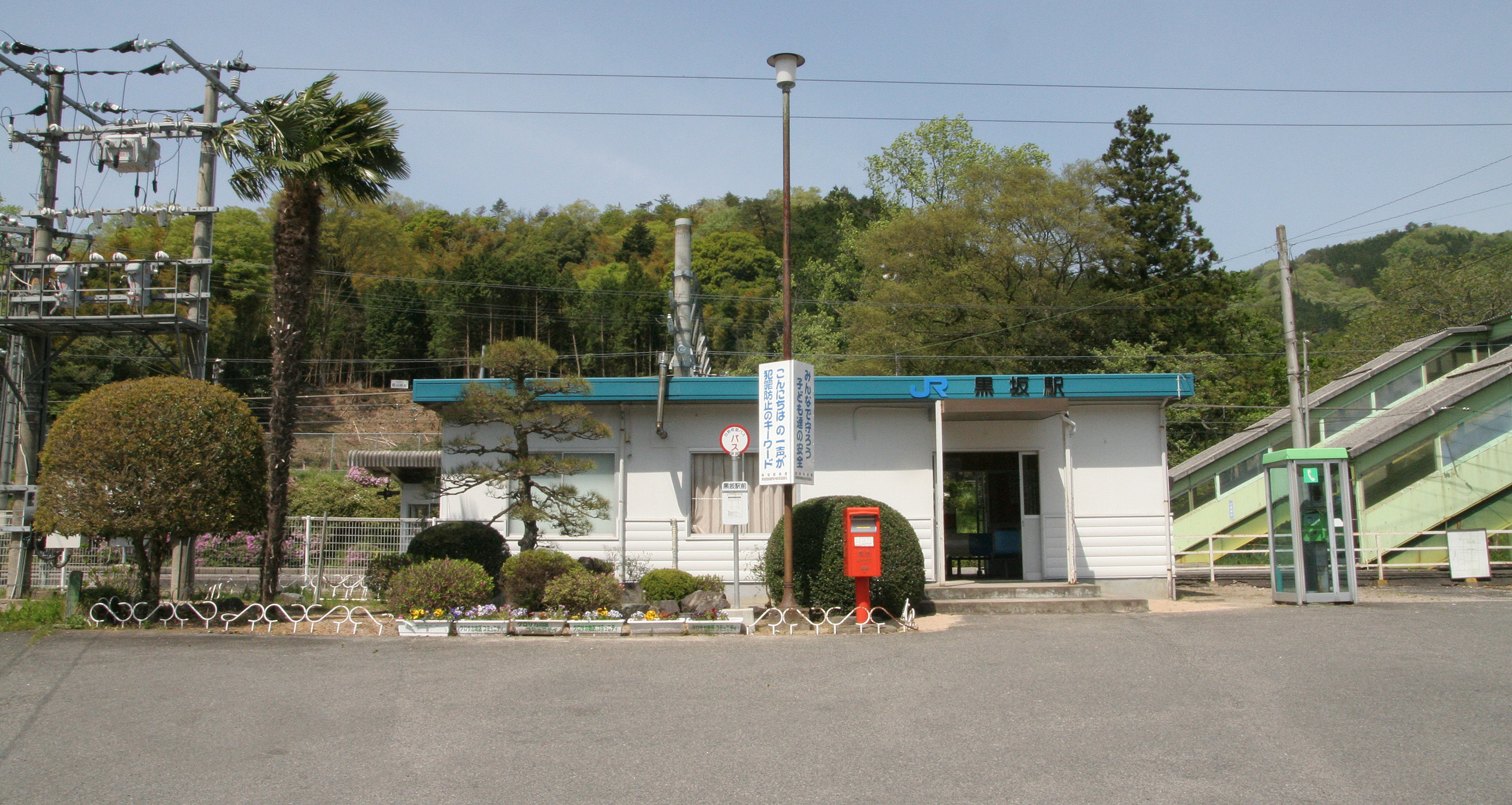 黒坂駅の駅舎